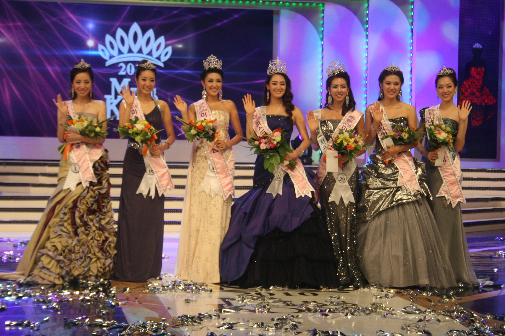 2010 미스코리아 당선자들